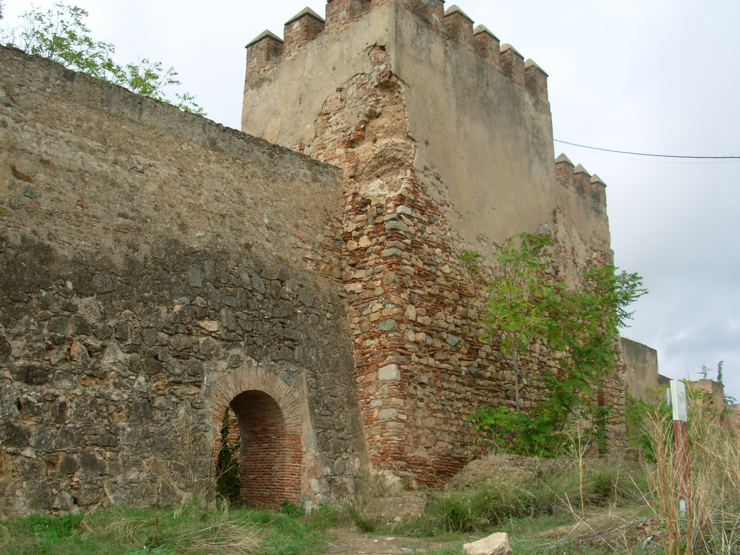 Puerta del Alpéndiz en la Alcazaba de Badajoz